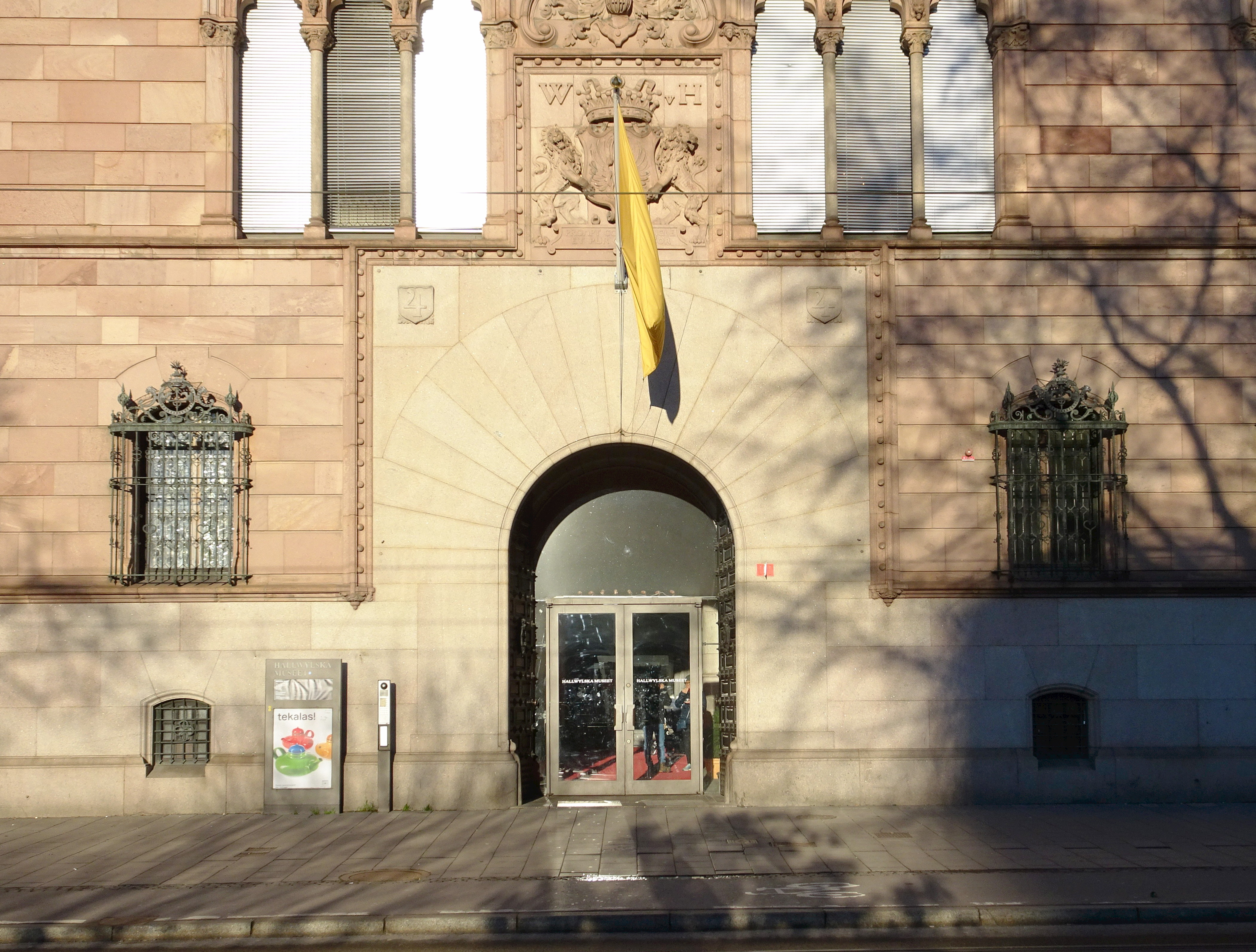 Hallwylska palatset entréportal